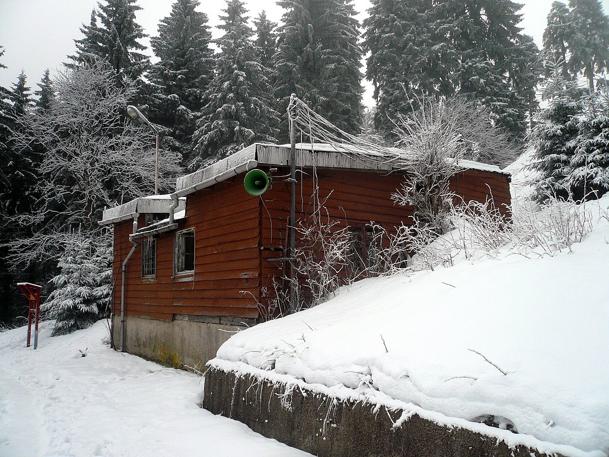 Thüringenschanze, Schanzentisch